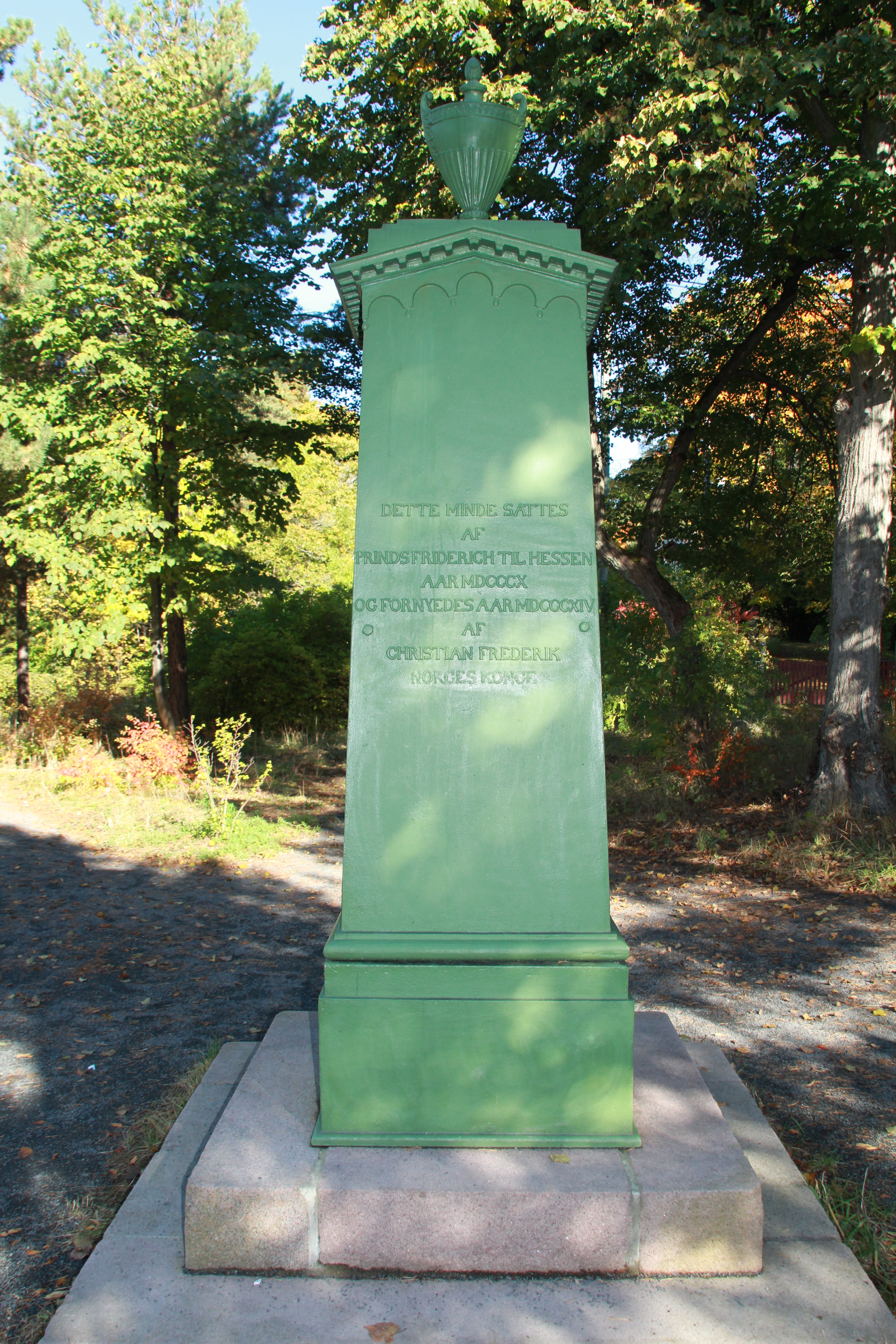 Prins Christian Augusts monument, Bygdøy. Monumentet er 2,7 meter høyt med en urne på toppen. Det er støpt i jern og bærer inskripsjonene "Venskabs Minde for Christian August" og "Dette Minde sattes af Prinds Friederich til Hessen Aas MDCCCX (1810) og fornyedes Aar MDCCCXIV (1814) af Christian Frederik, Norges Konge".